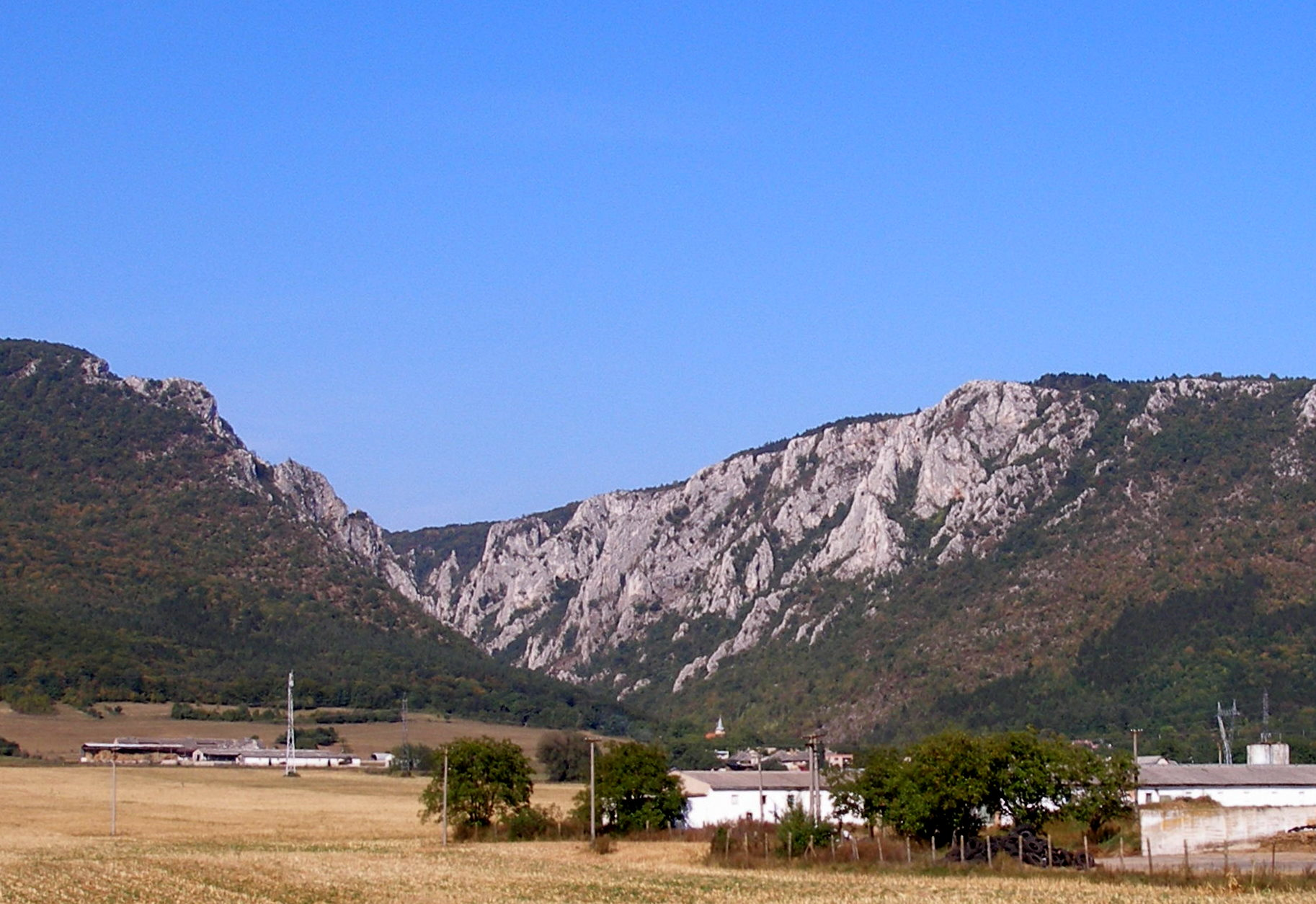 Vchod do Zádielskej doliny